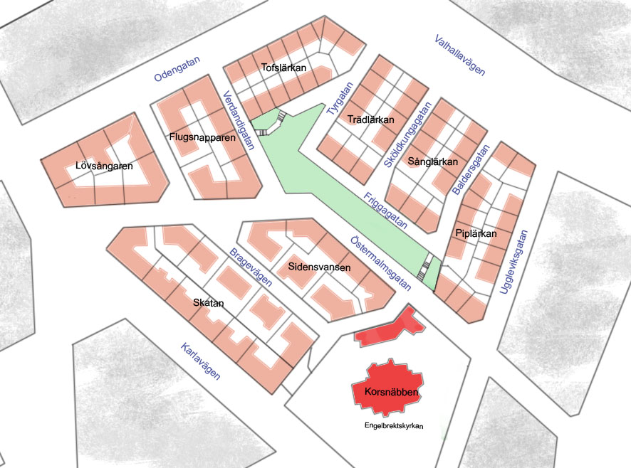 Karta över Lärkstaden, Stockholm